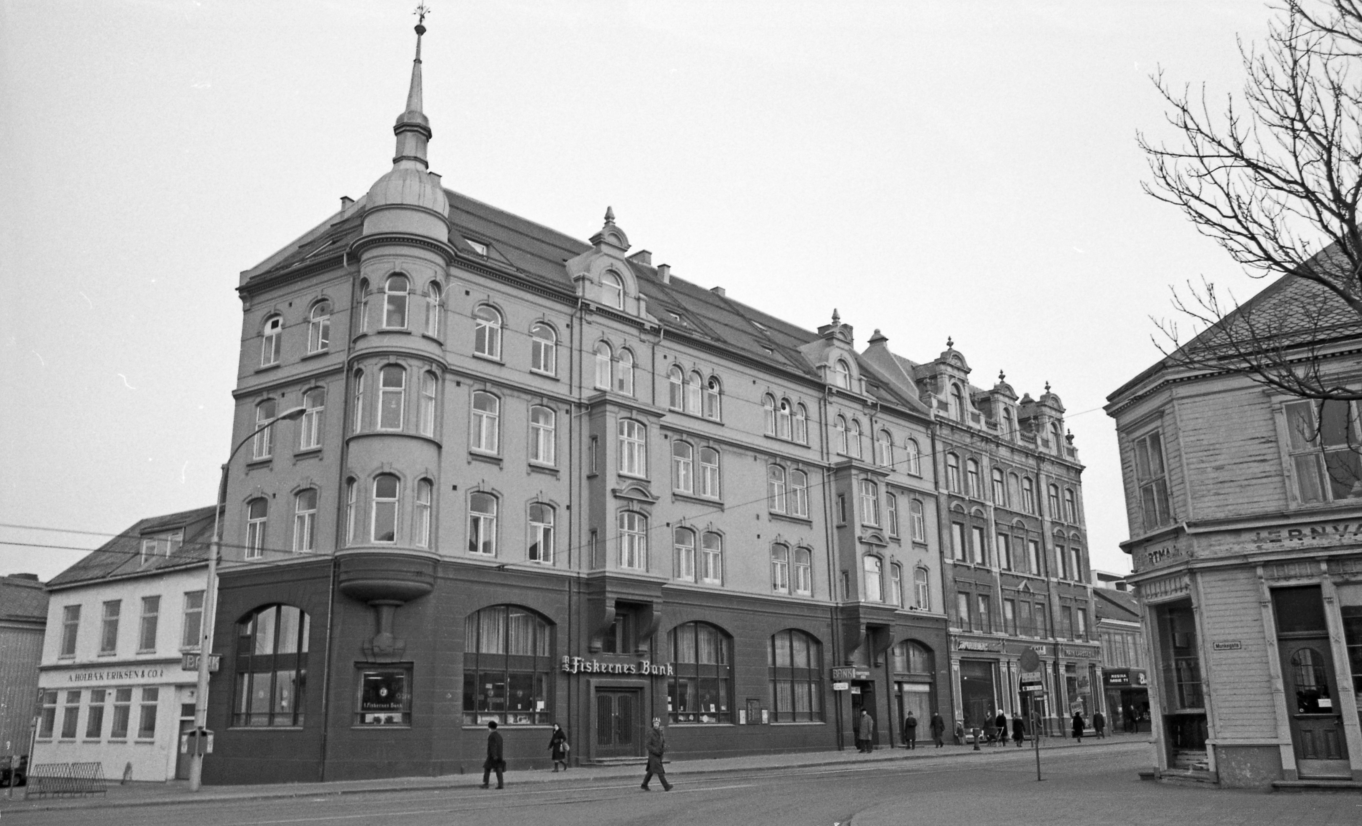 Format: 35 mm sort/hvitt negativ Film: Kodak pluss x pan Safety Film Dato / Date: 1972 Fotograf / Photographer: Ukjent Sted / Place: Olav Tryggvasons gate 34 - 40, Trondheim Wikipedia: Olav Tryggvasons gate Kart / Maps: [xxx Google Maps] [xxx Google Street View] [xxx Flyfoto 1964] [xxx Flyfoto 1937] Eier / Owner Institution: Trondheim byarkiv, The Municipal Archives of Trondheim Arkivreferanse / Archive reference: Tor.H43.P3.F10859, film 184 Merknad: Fra Byantikvarens negativsamling. Olav Tryggvasons gate ble i 1897 oppkalt etter Kong Olav I Tryggvason og er en av byens viktigste gjennomfartsårer.